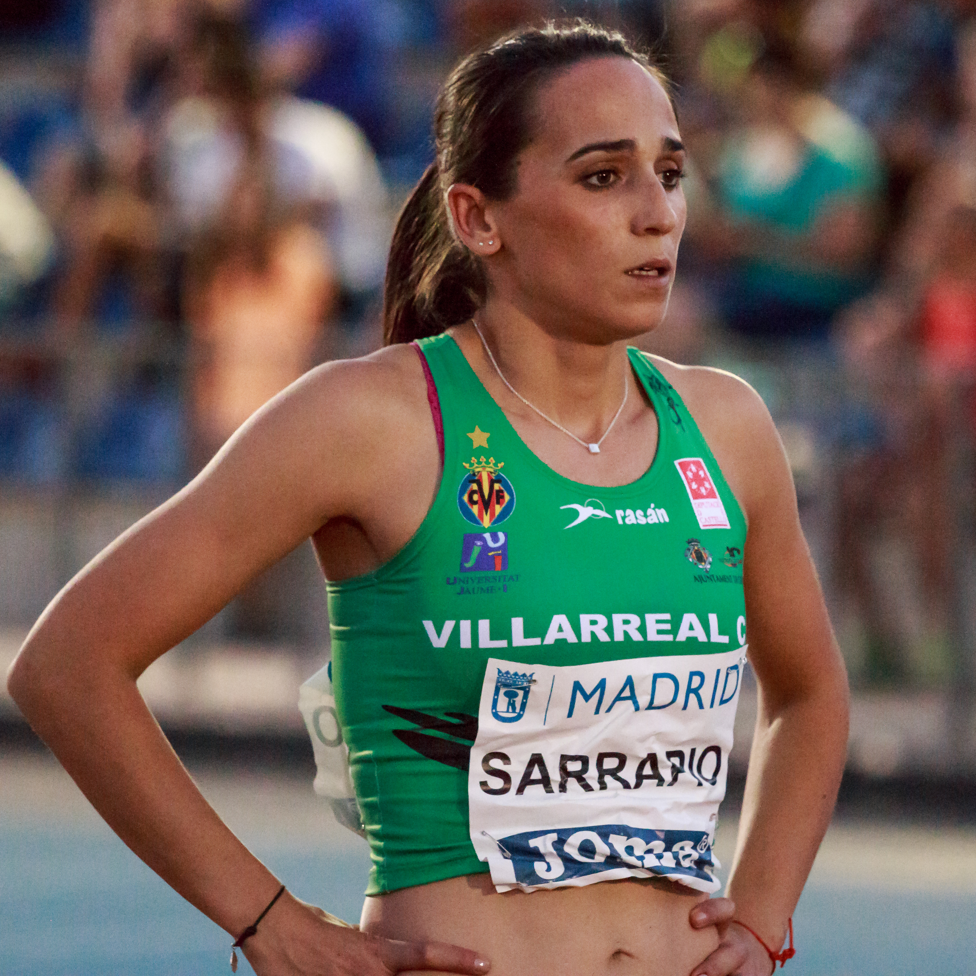 Patricia Sarrapio (ESP). Triple salto. IAAF World Challenge. Meeting Madrid 2017. Moratalaz, Madrid.